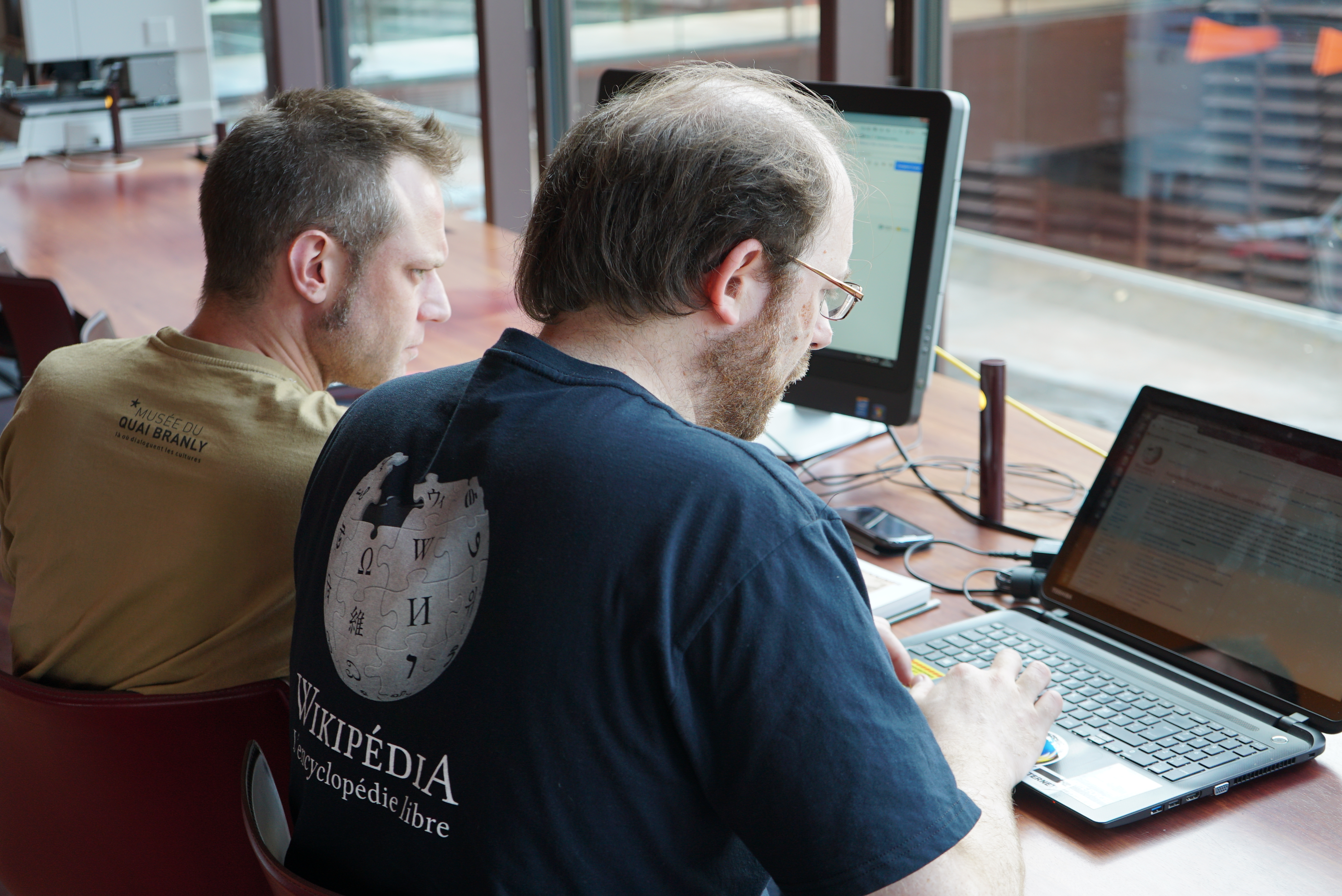 exemple de contribution en atelier par binome.